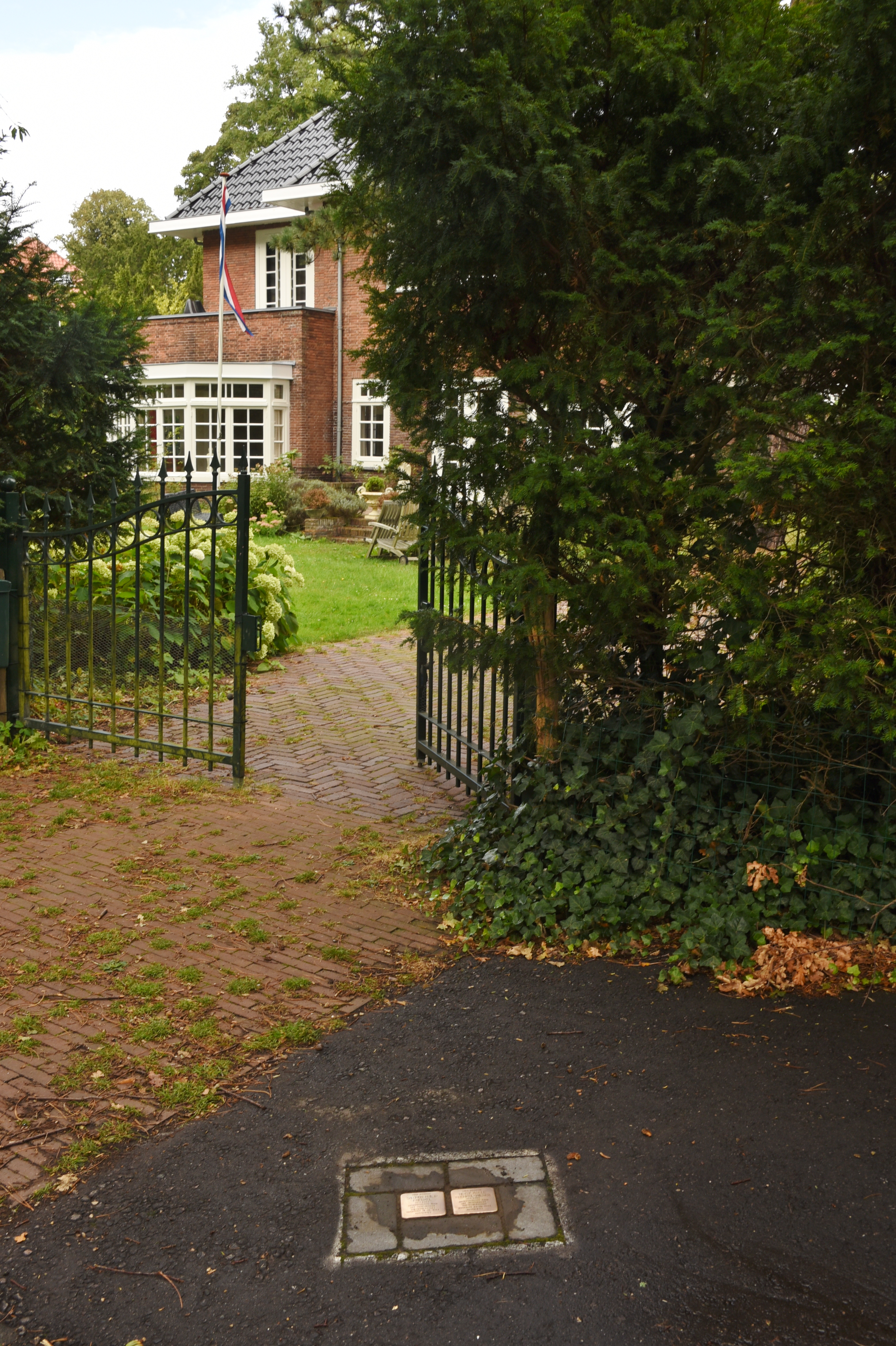 Stolpersteine für das Ehepaar Frenkel